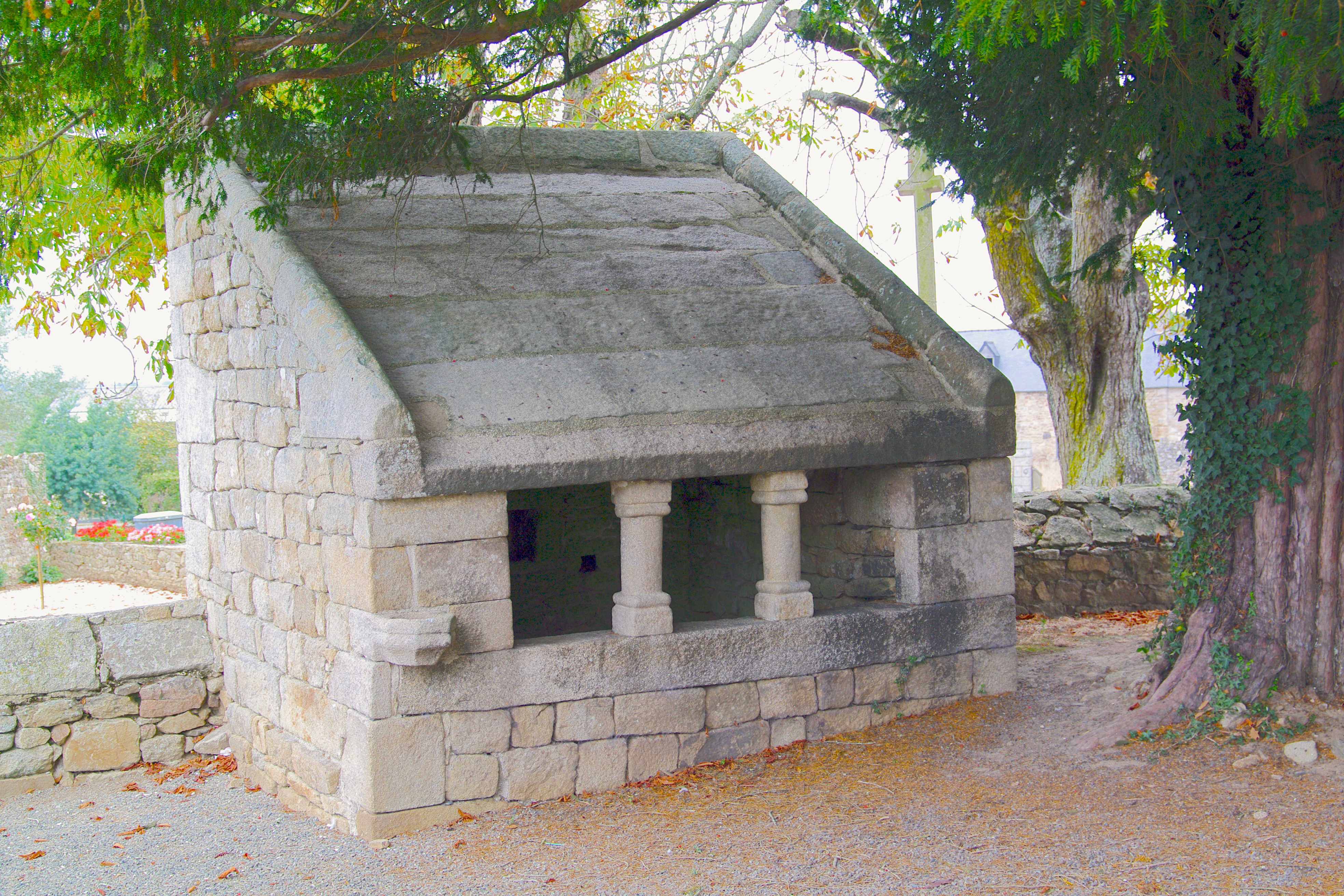 Ossuaire, (Inscription, 1927)